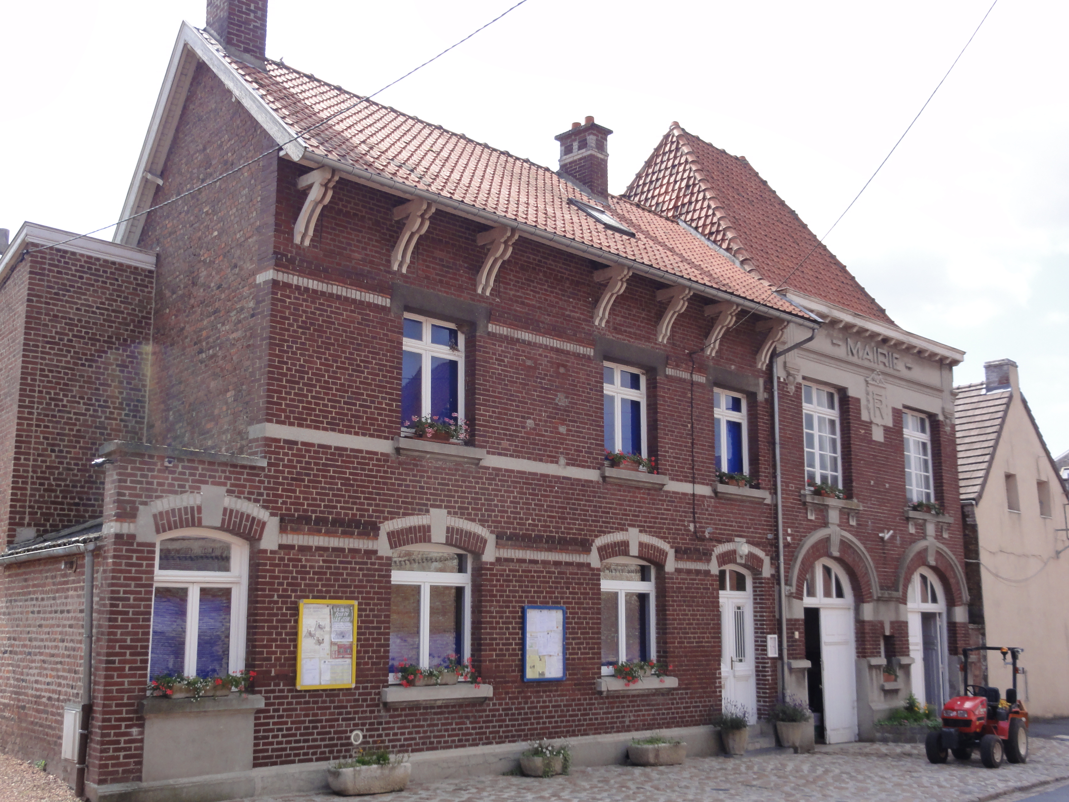 Sommaing (Nord, Fr) mairie